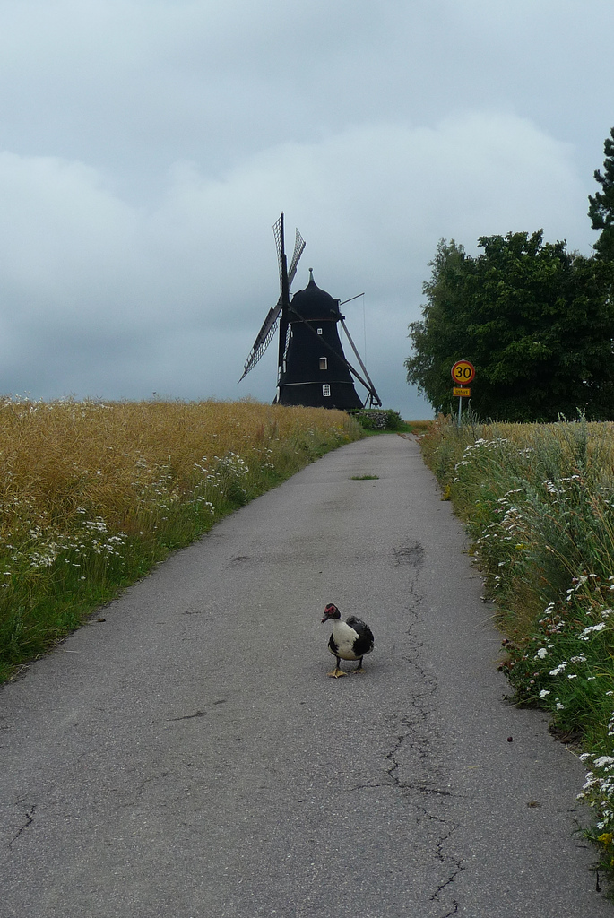 Windmill in Bonderup defended by duck